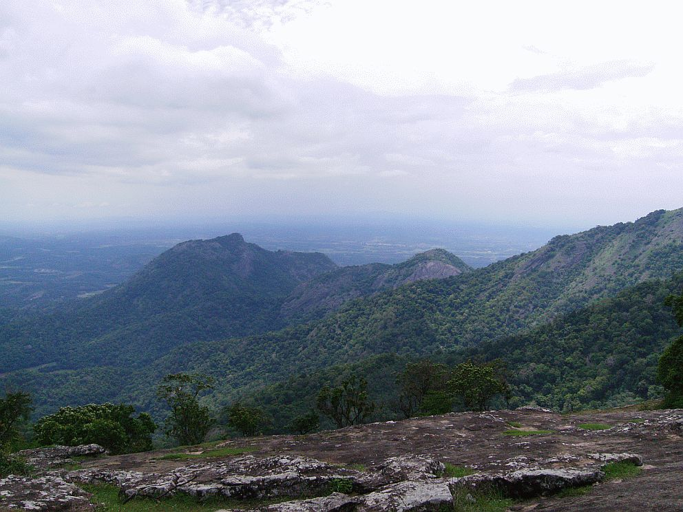 കേശവൻ‌പാറ